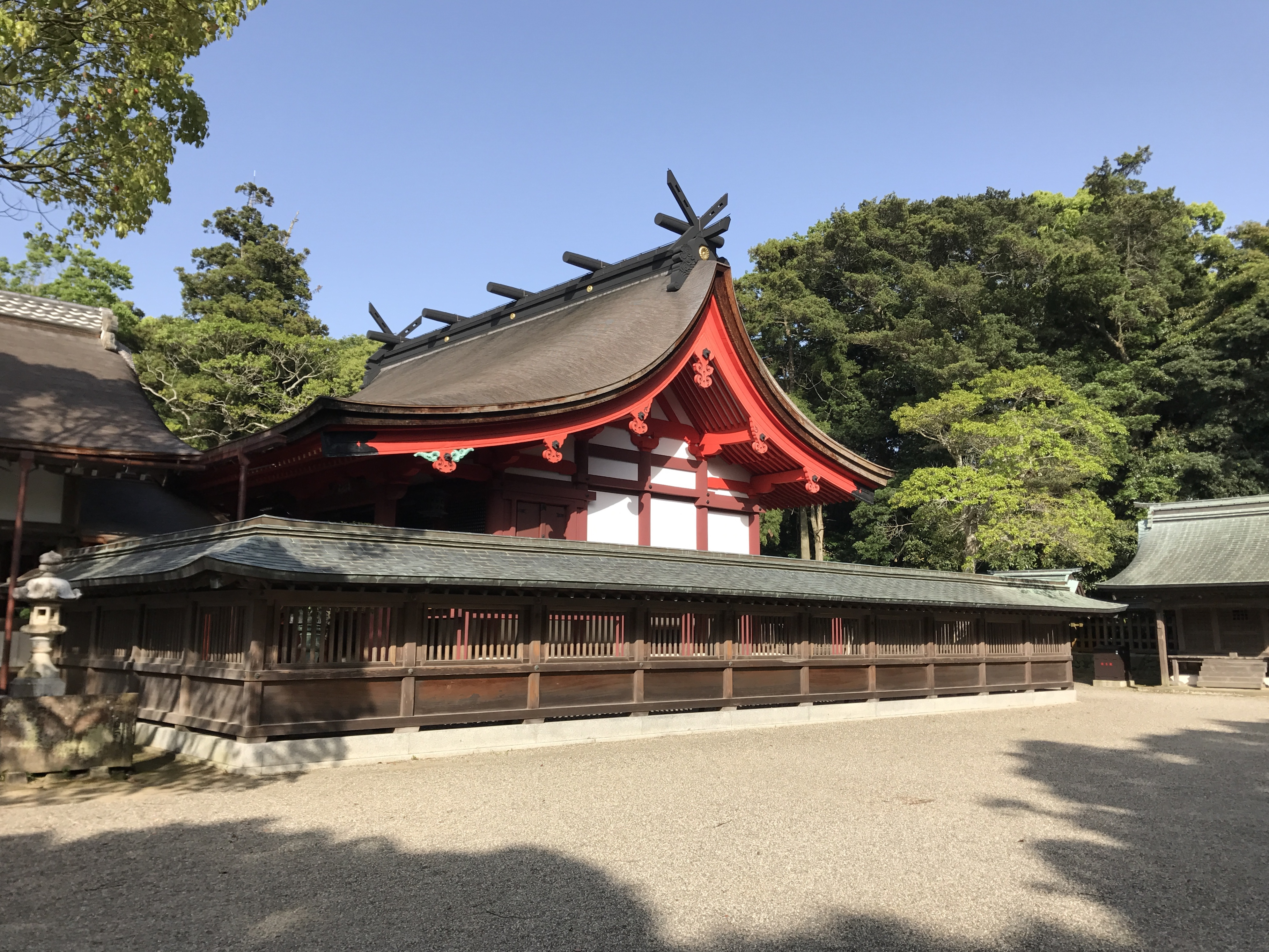 宗像大社(辺津宮)の本殿